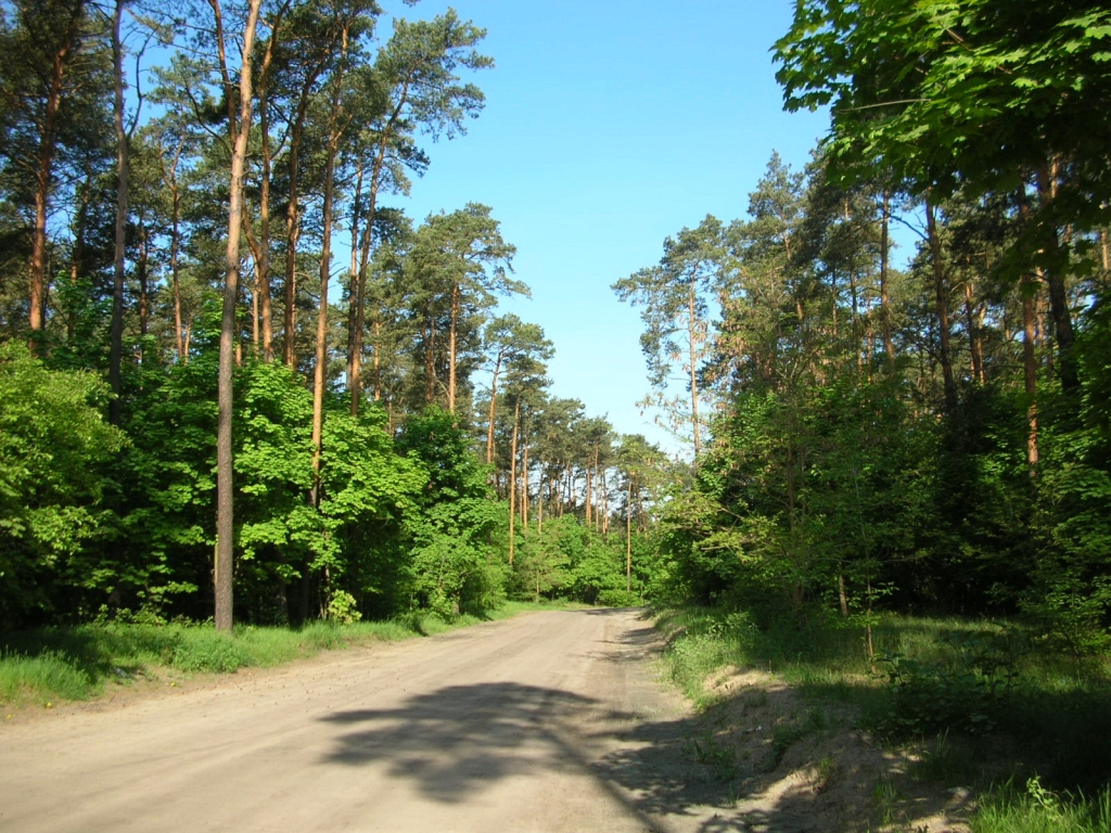 Las miedzyński w Bydgoszczy